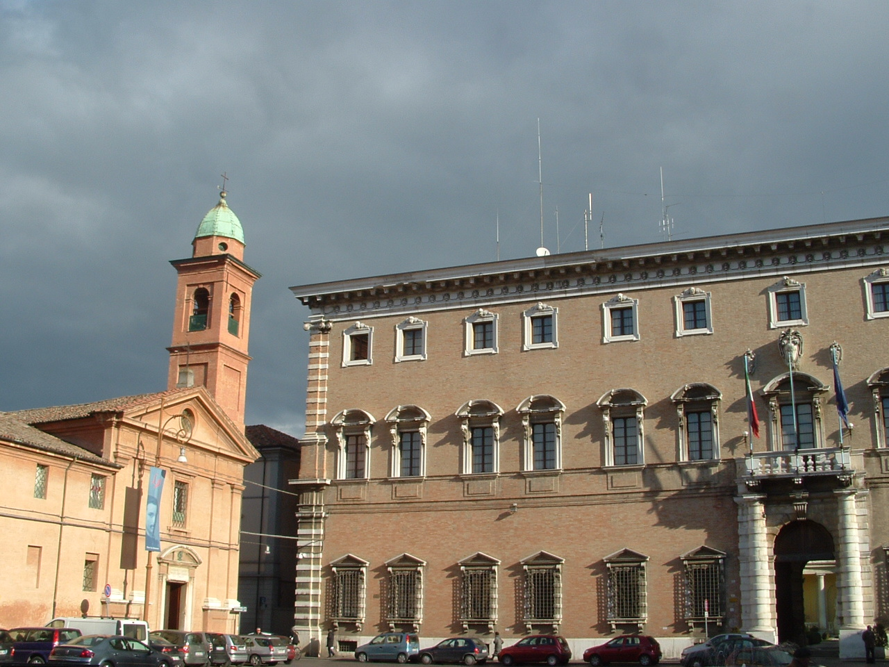 Piazza Ordelaffi di Forlì